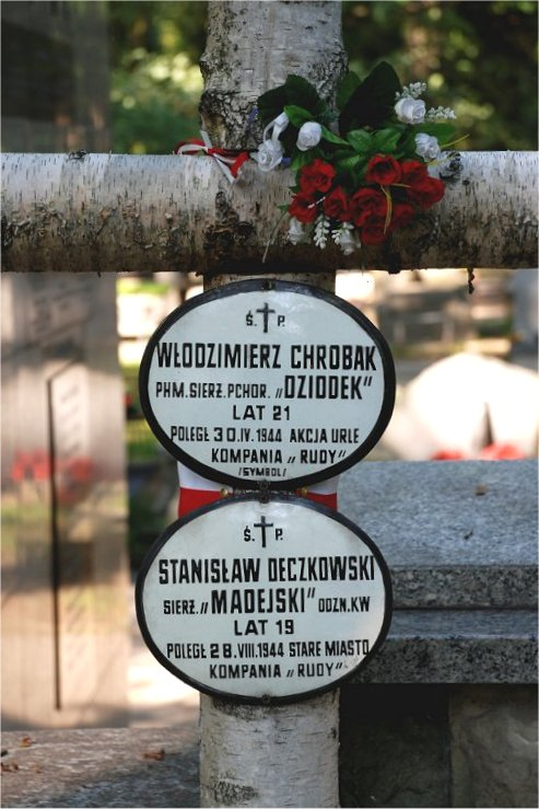 Włodzimierz Chrobak, Stanisław Deczkowski, Powązki Wojskowe w Warszawie